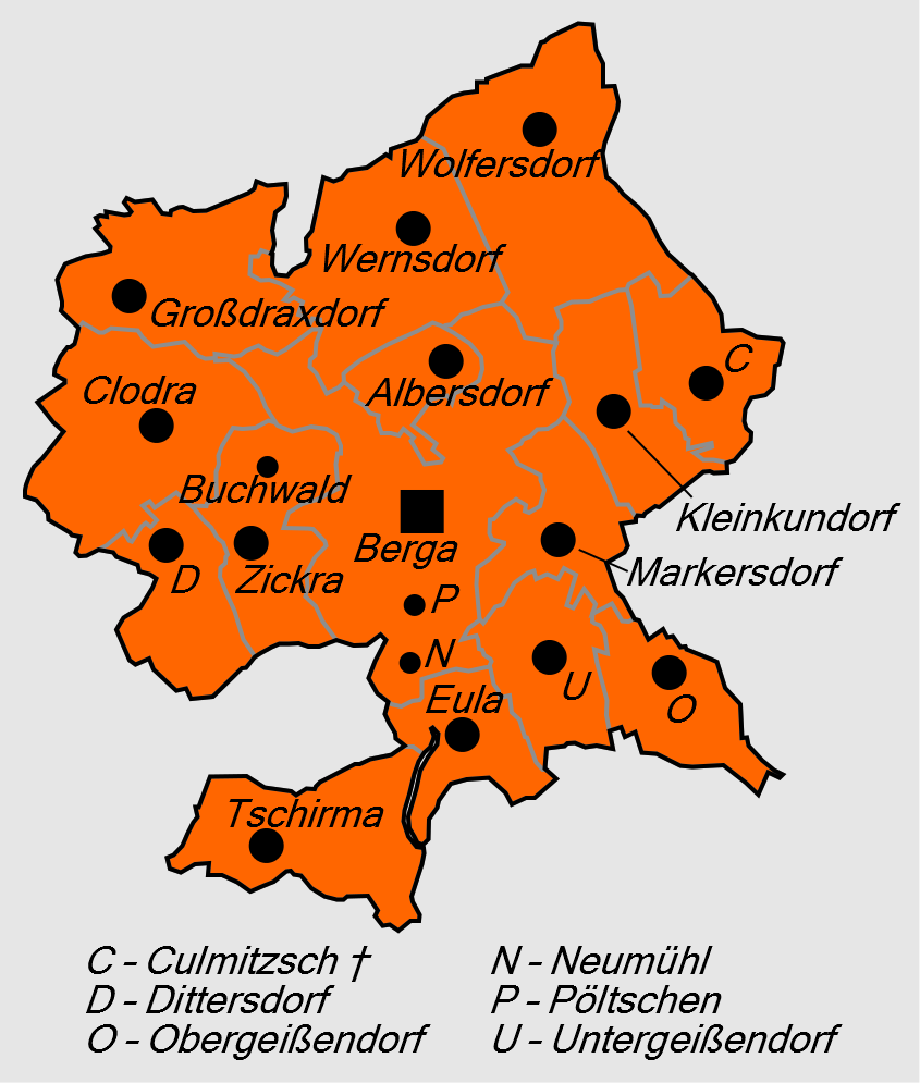 Gliederung der Stadt Berga/Elster ab 8. März 1994